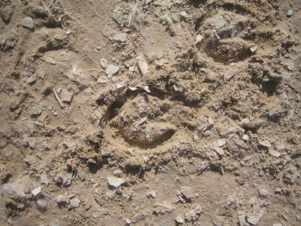 Reitplatz, Arenatex, Zuschlagstoffer für Reitböden